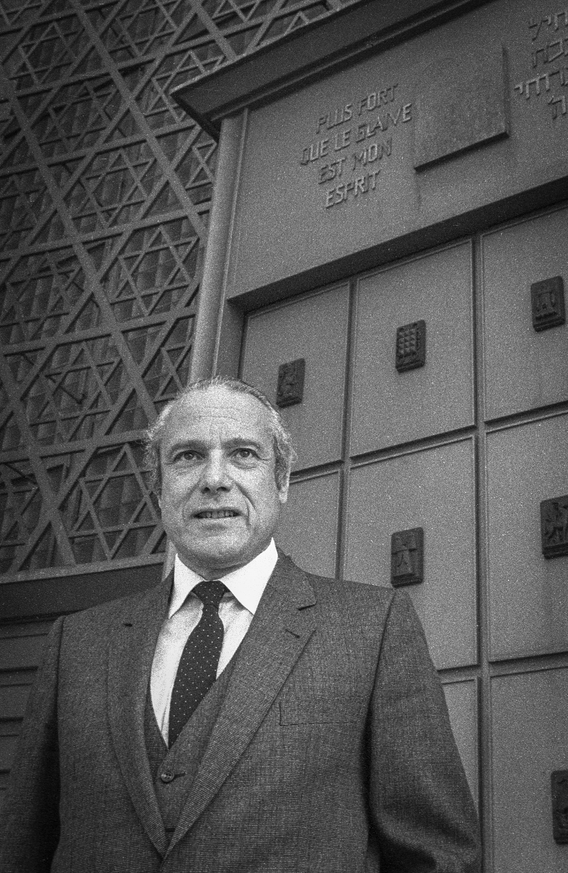 Jean Kahn par Claude Truong-Ngoc en octobre 1980.